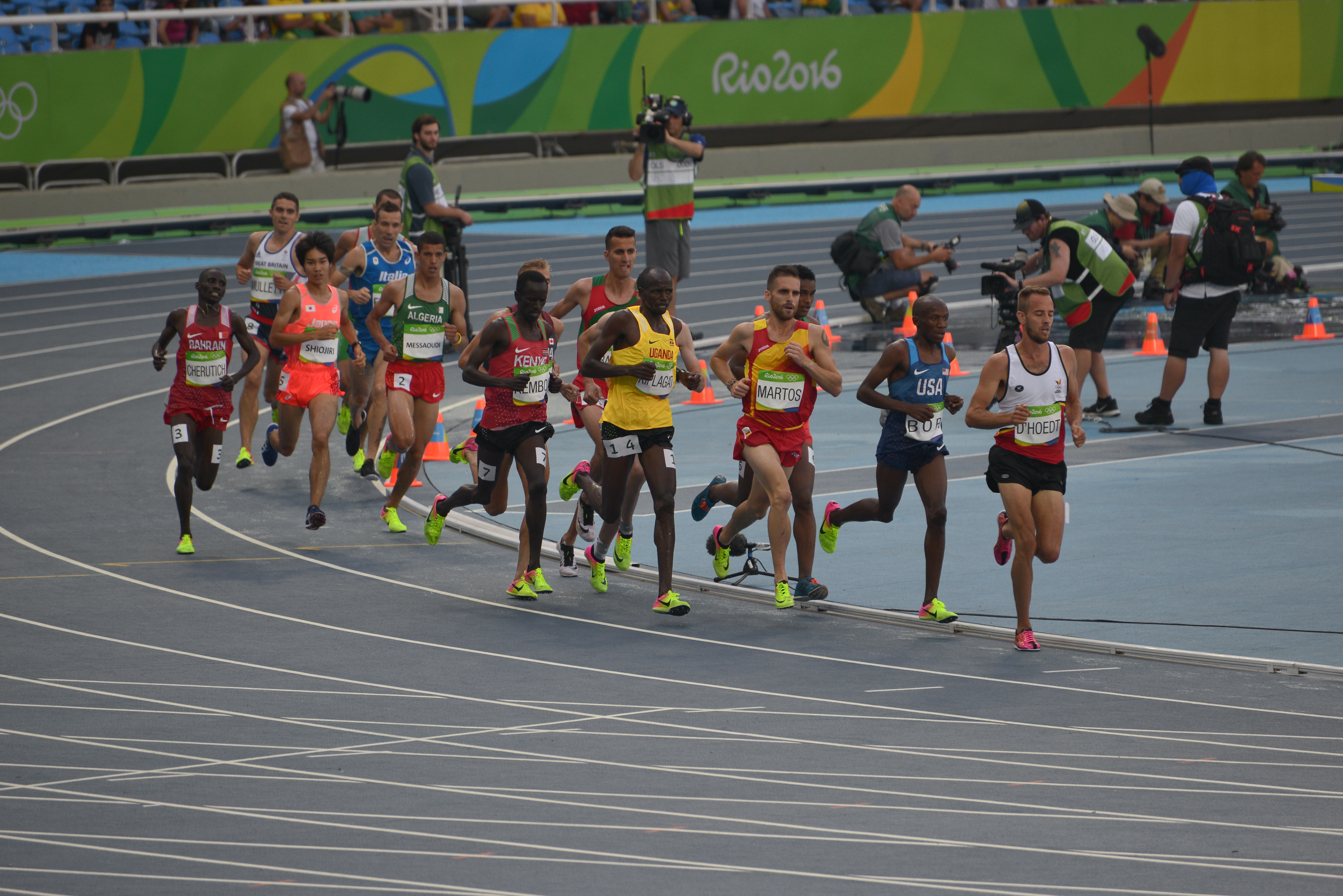 Série du 3000m steeple Homme des JO de Rio, 2016